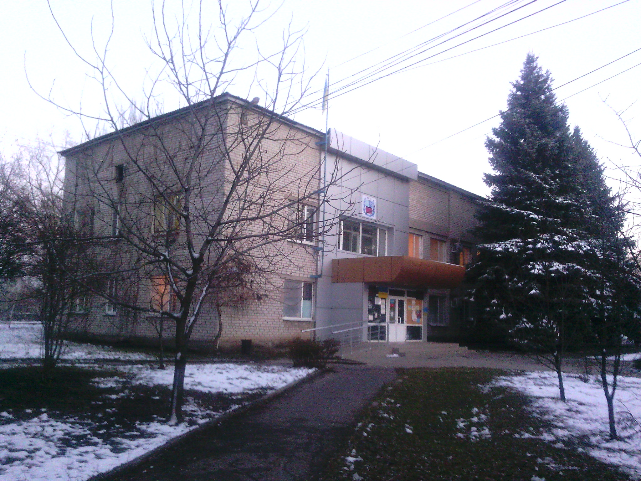 Будівля Авдіївської міськради